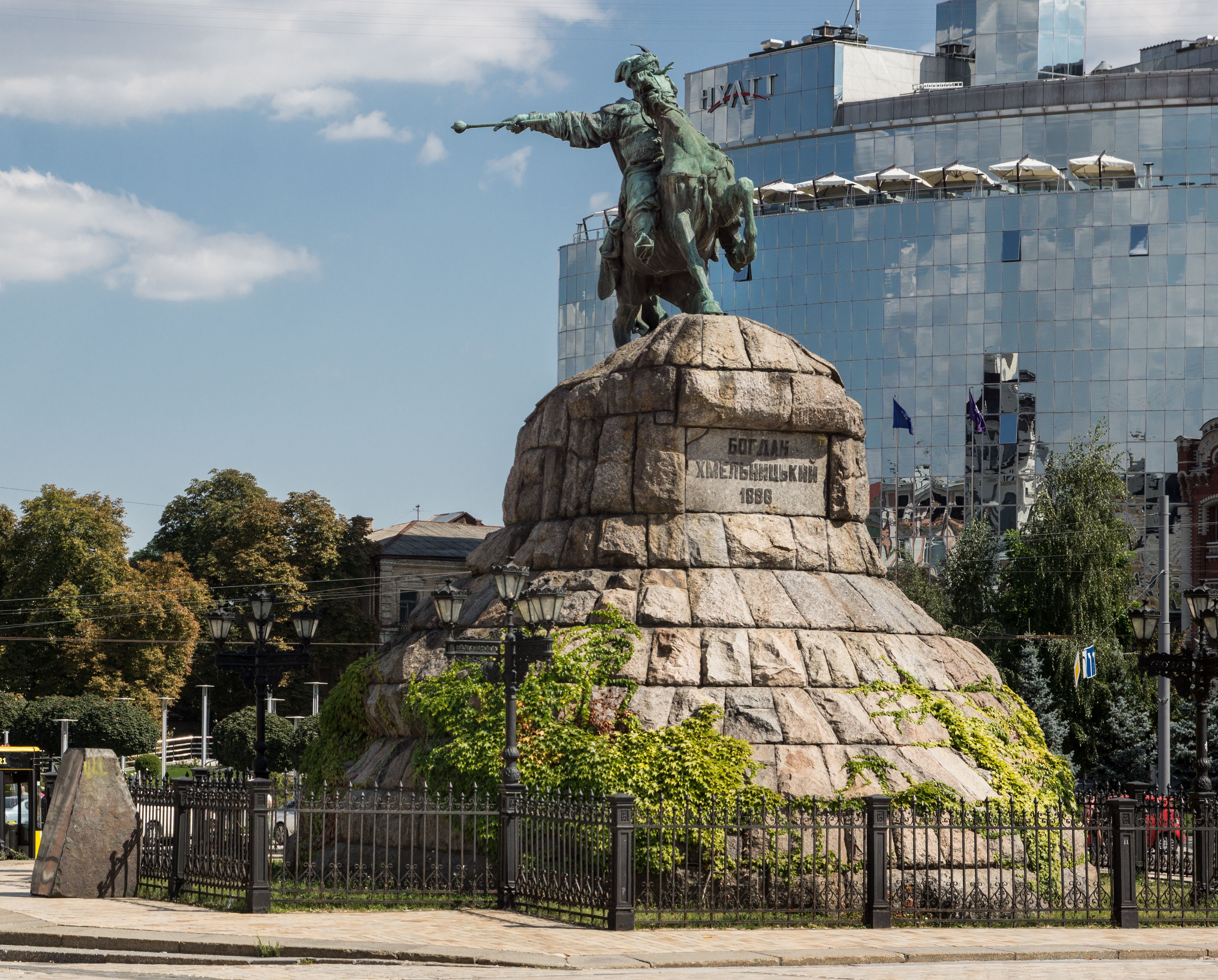 Monumento a Bogdan Khmelnitsky